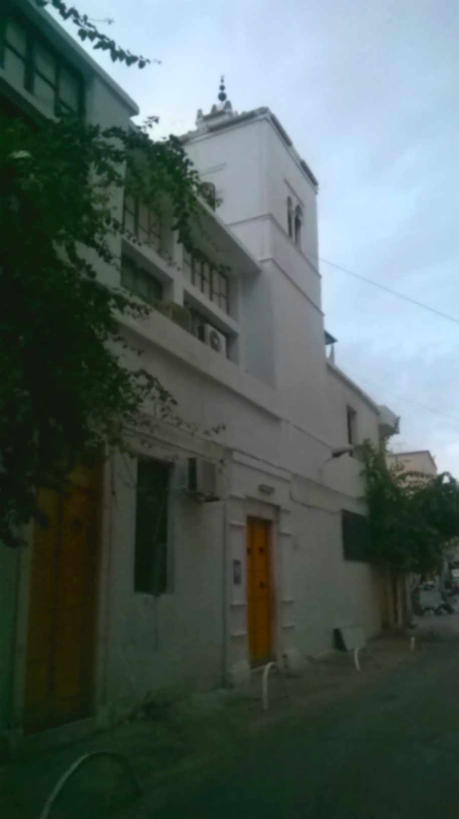 Rue de la Sabkha, Sidi El Béchir, Tunis نهج السبخة، سيدي البشير، تونس العاصمة